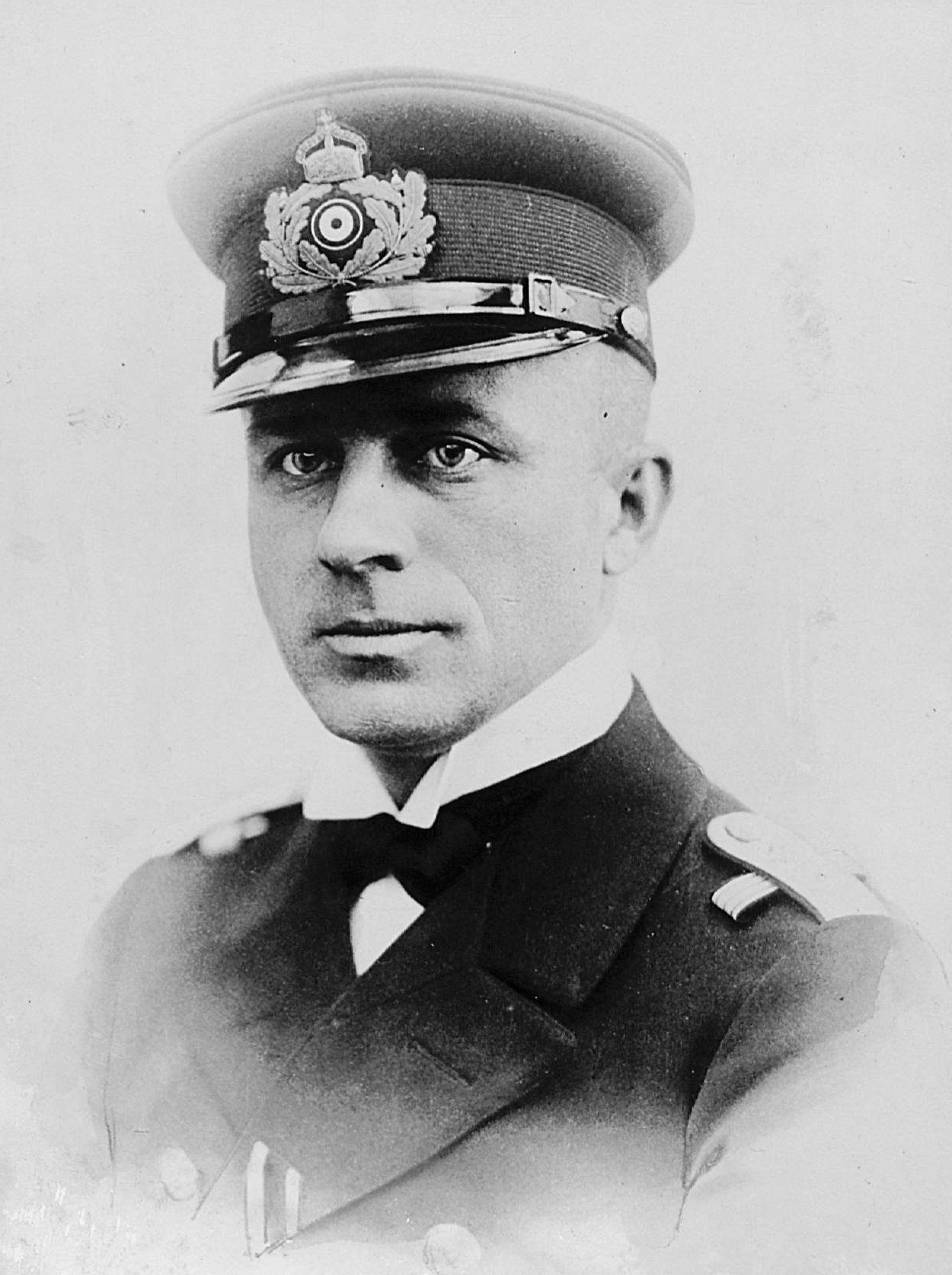 Lothar von Arnauld de la Perière